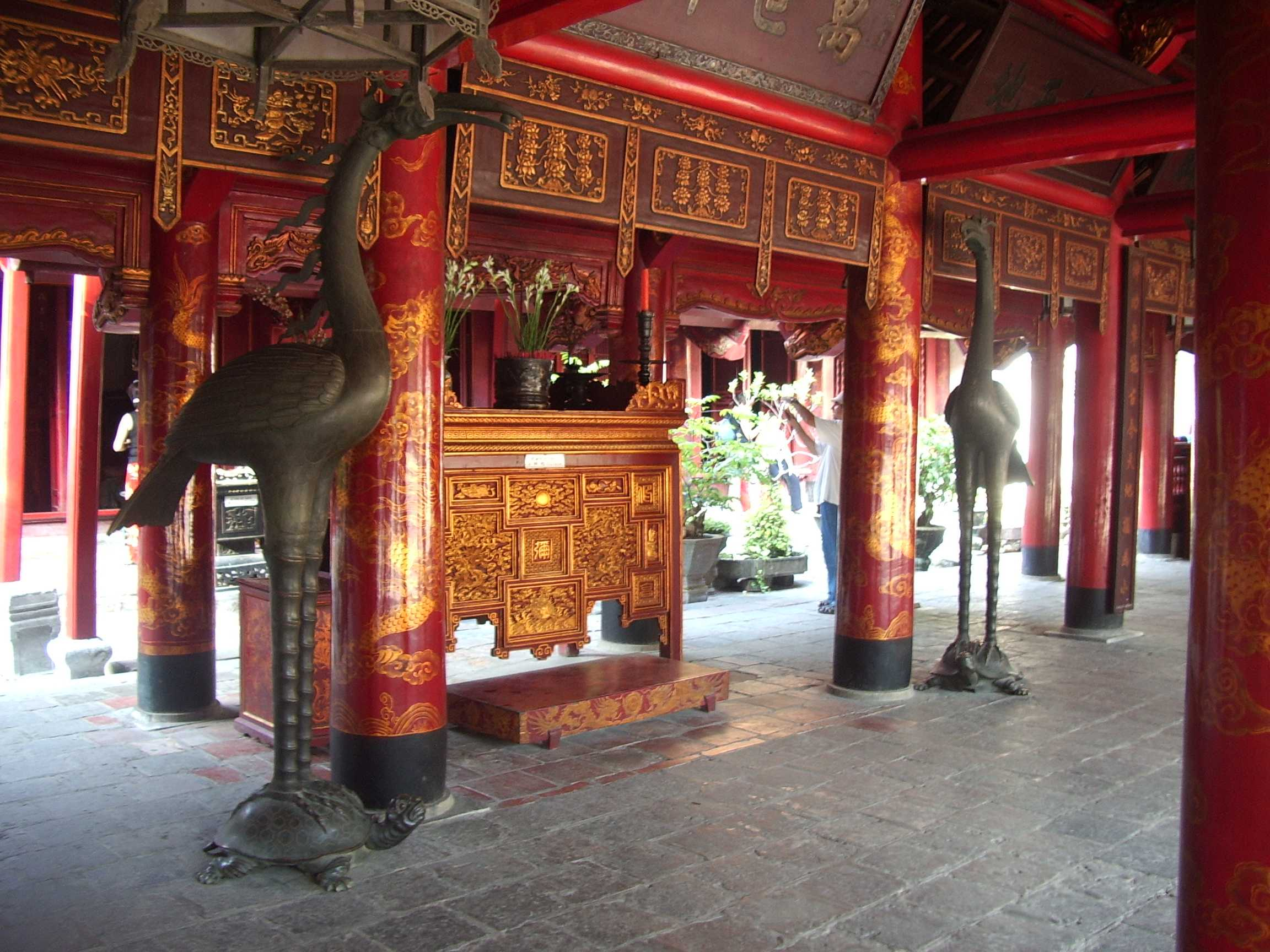 folgt